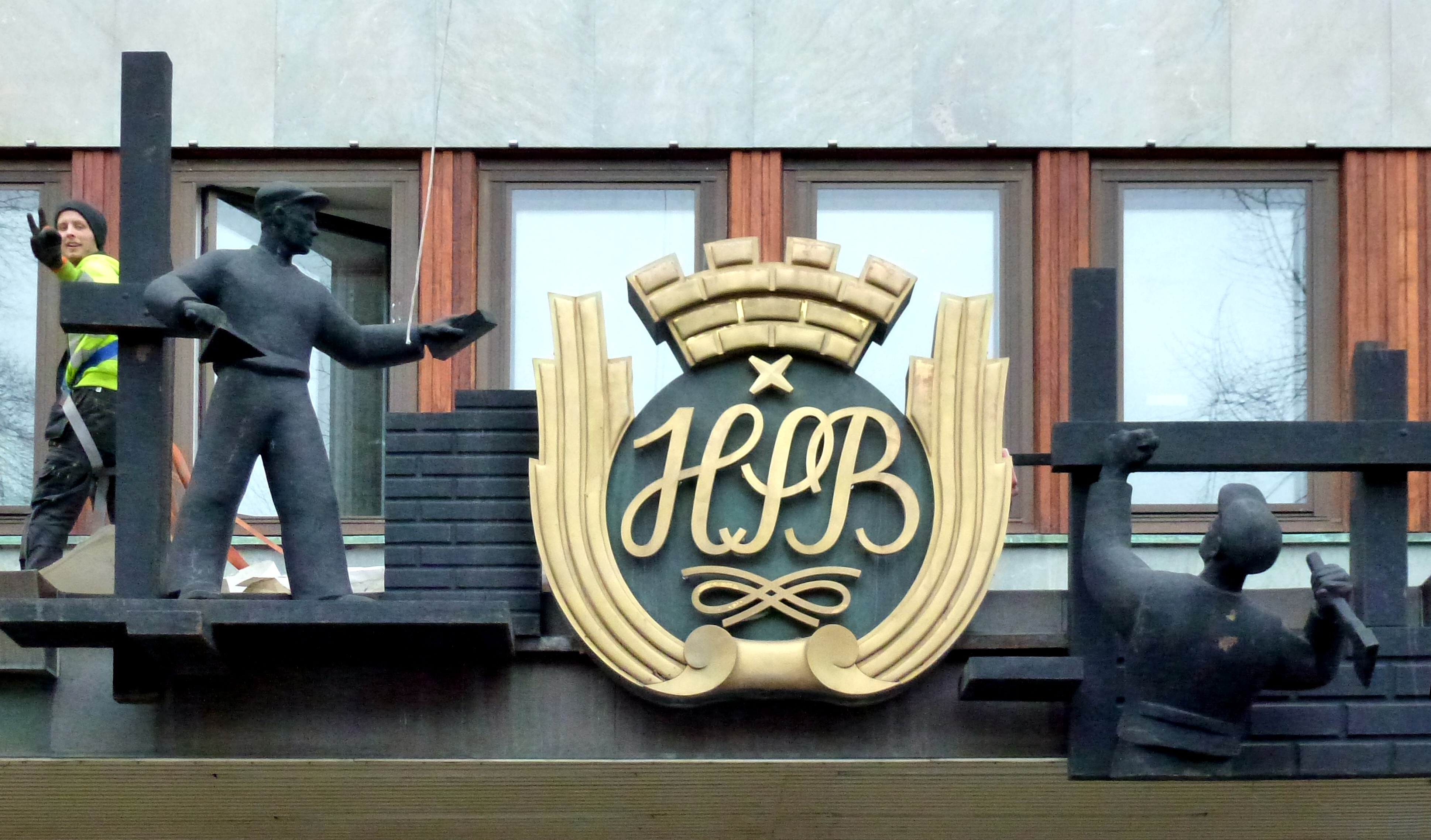 HSB Fleminggatan